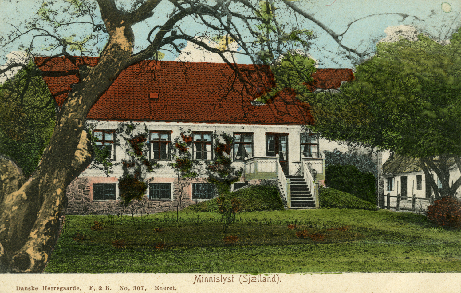 Minnislyst hovedbygning på Postkort serie Danske Herregaarde ca 1905